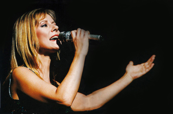 Dorothée au Zénith en 1996